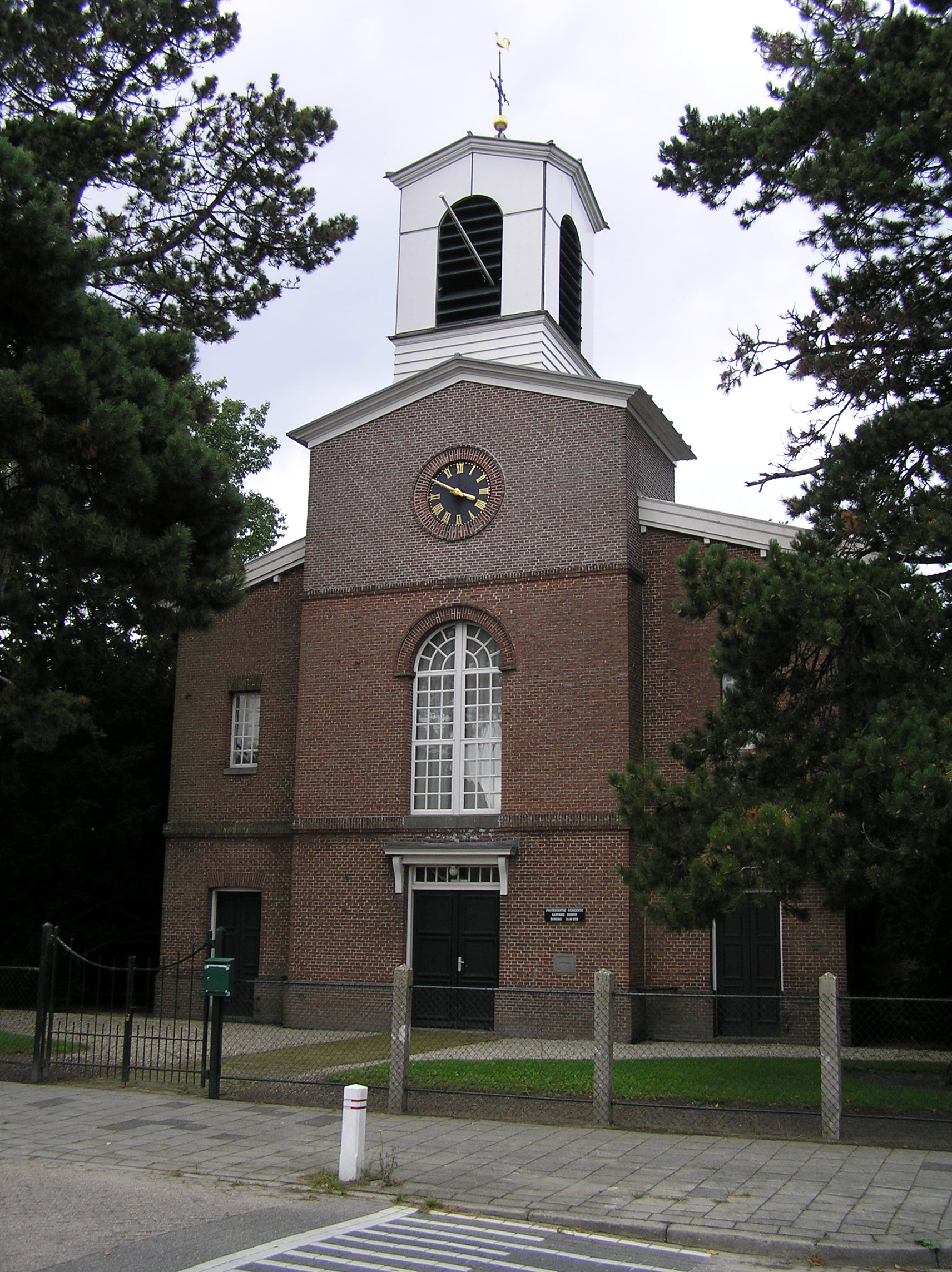 Kerk Wilhelminadorp. Rijksmonument.